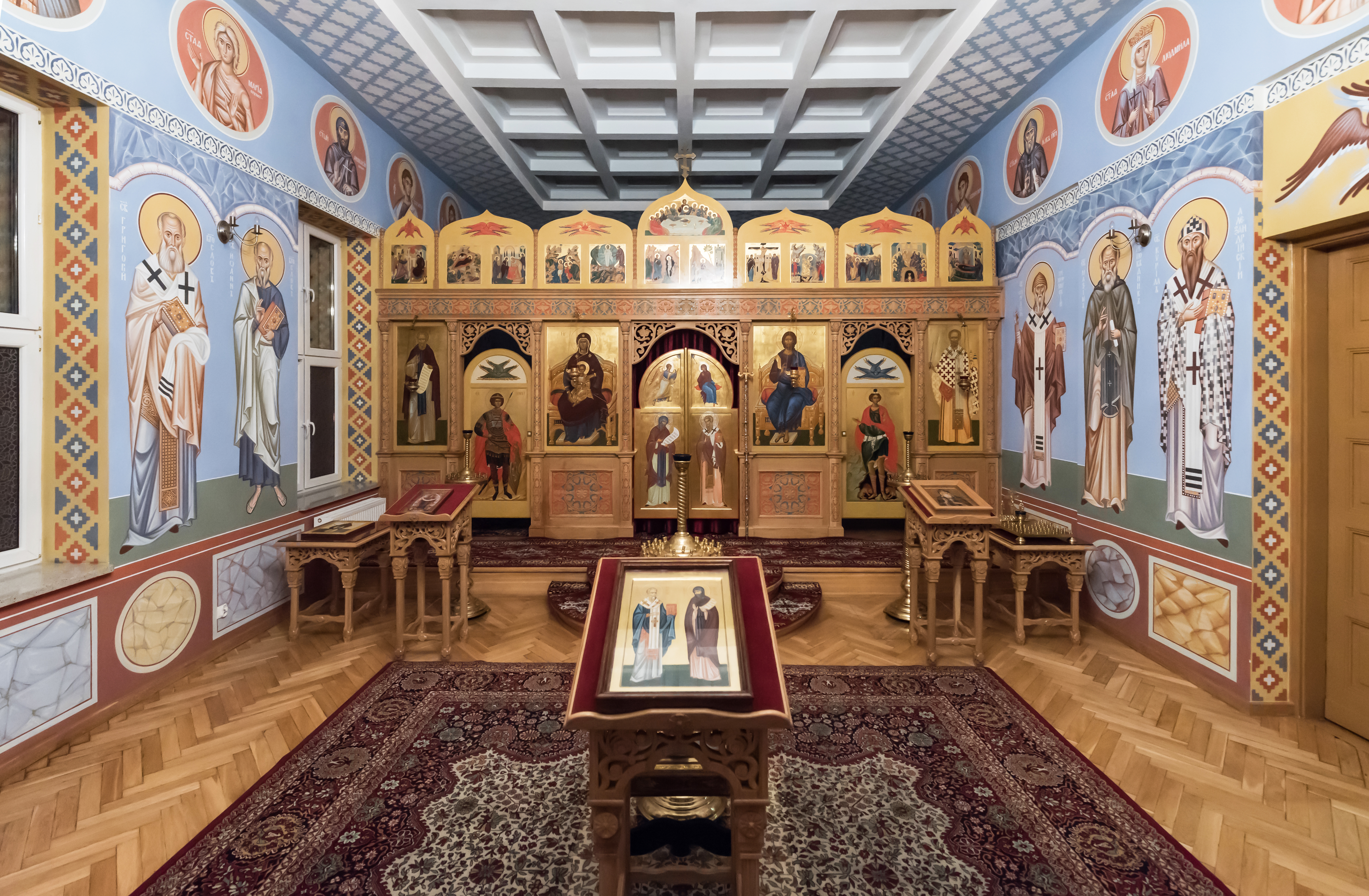 Prawosławna kaplica akademicka Świętych Cyryla i Metodego w Centrum Kultury Prawosławnej przy ul. Świętych Cyryla i Metodego w Warszawie